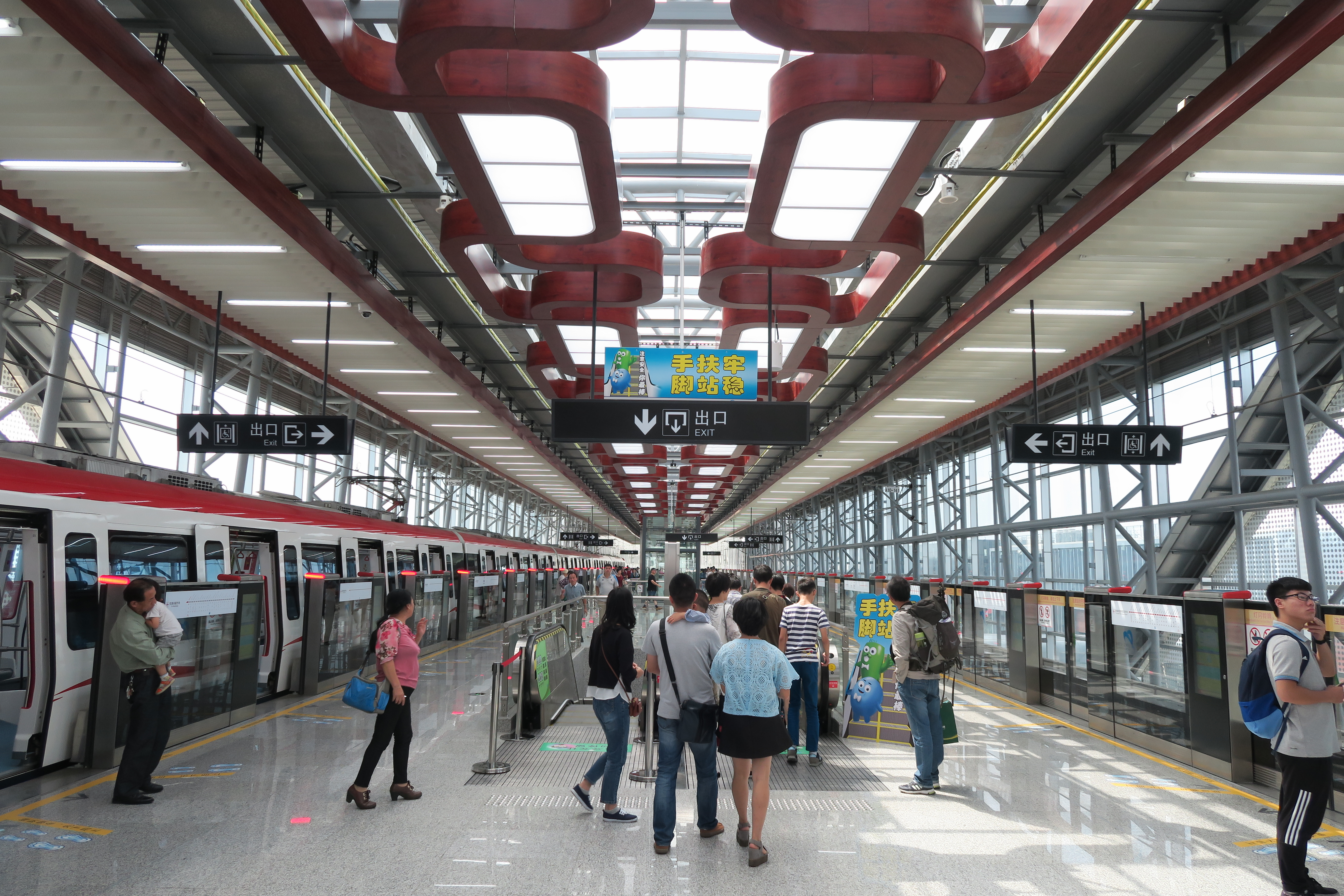 宁波地铁清水浦站